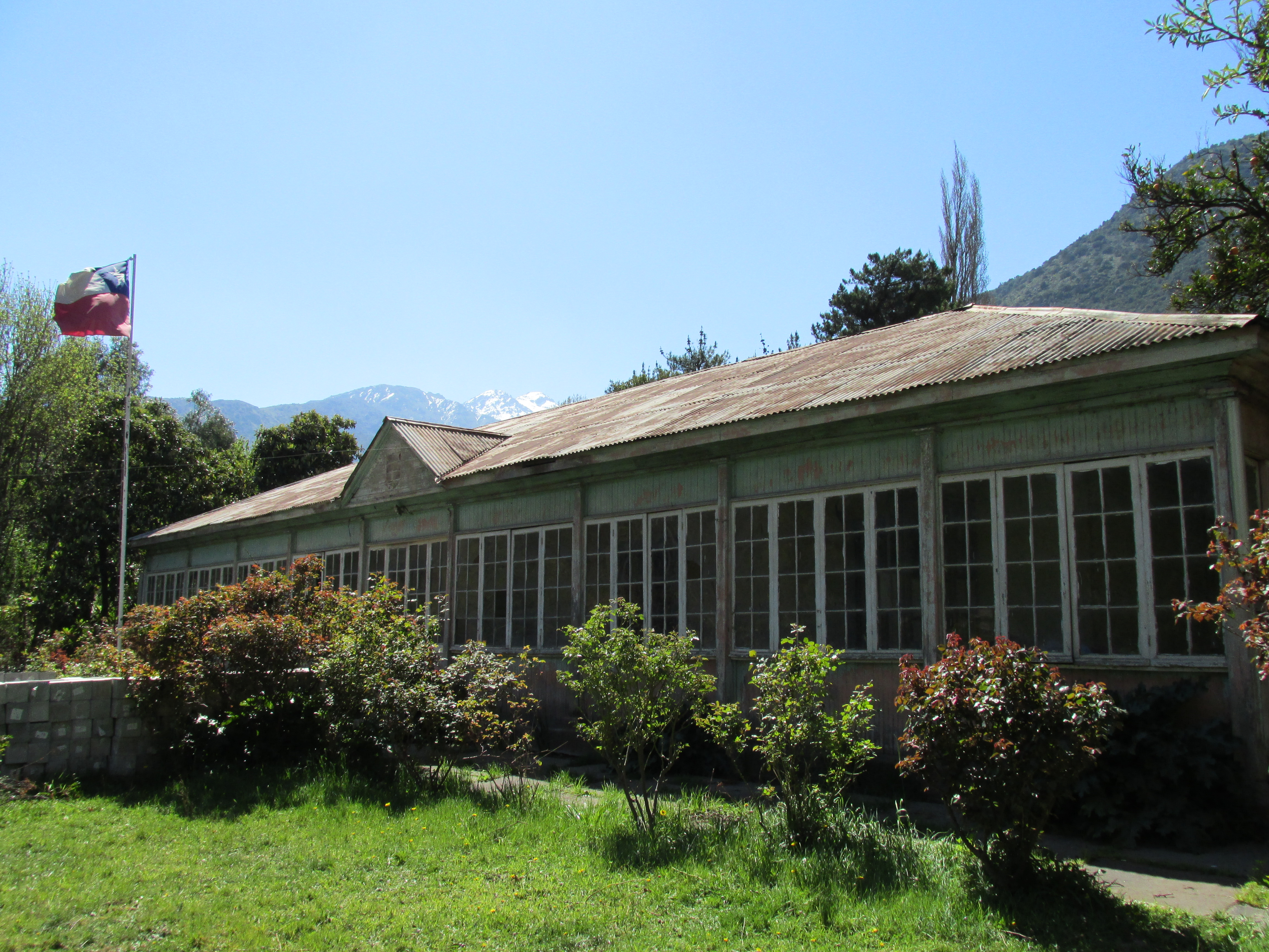 Aduana El Manzano This is a photo of a national monument in Chile: 1007